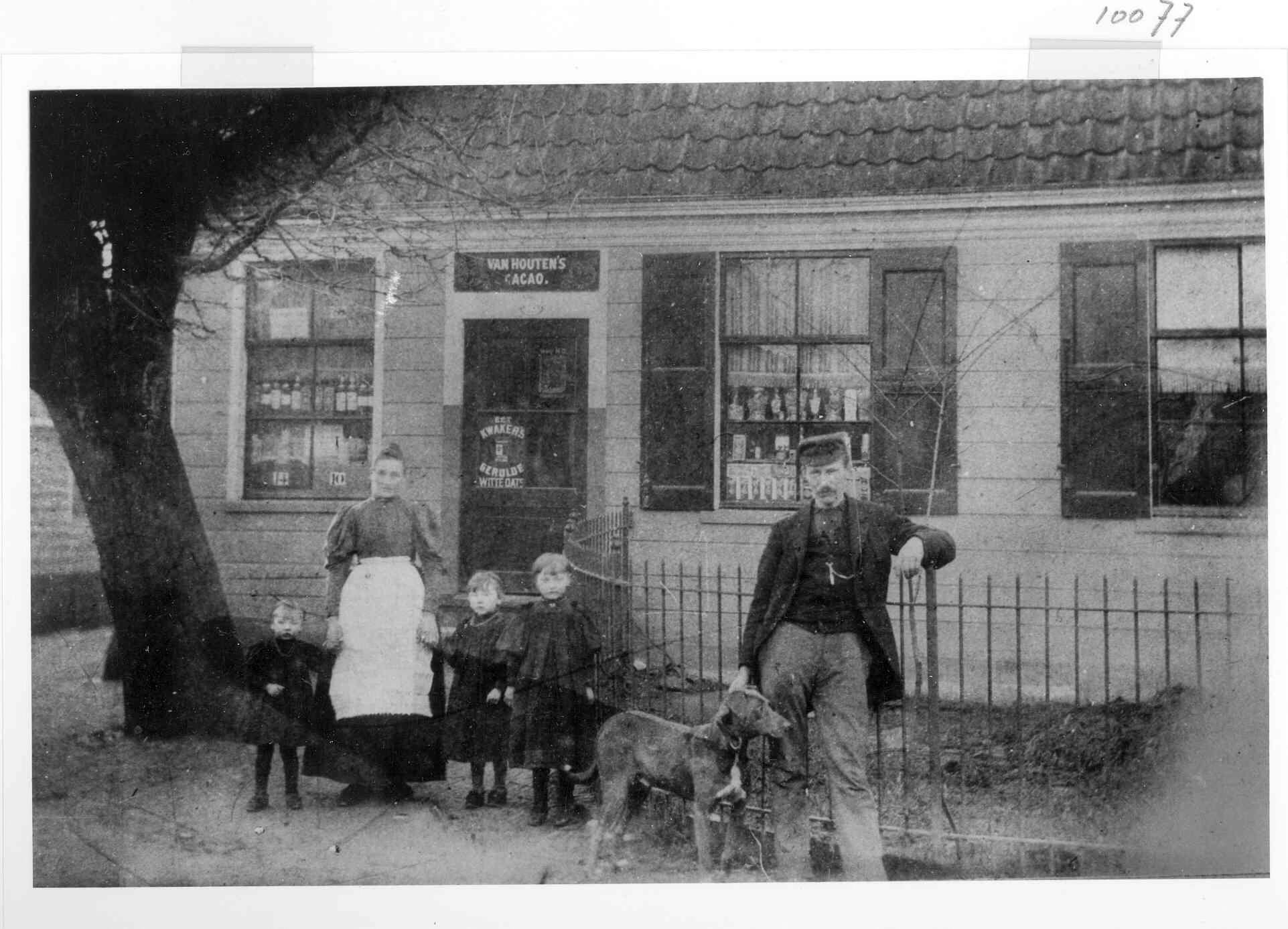 Dhr. A.Heijn senior met zijn vrouw Neeltje Heijn-de Ridder en hun kinderen Antje, Immetje en Trijntje, voor hun eerste winkeltje in Oostzaan ca. 1895